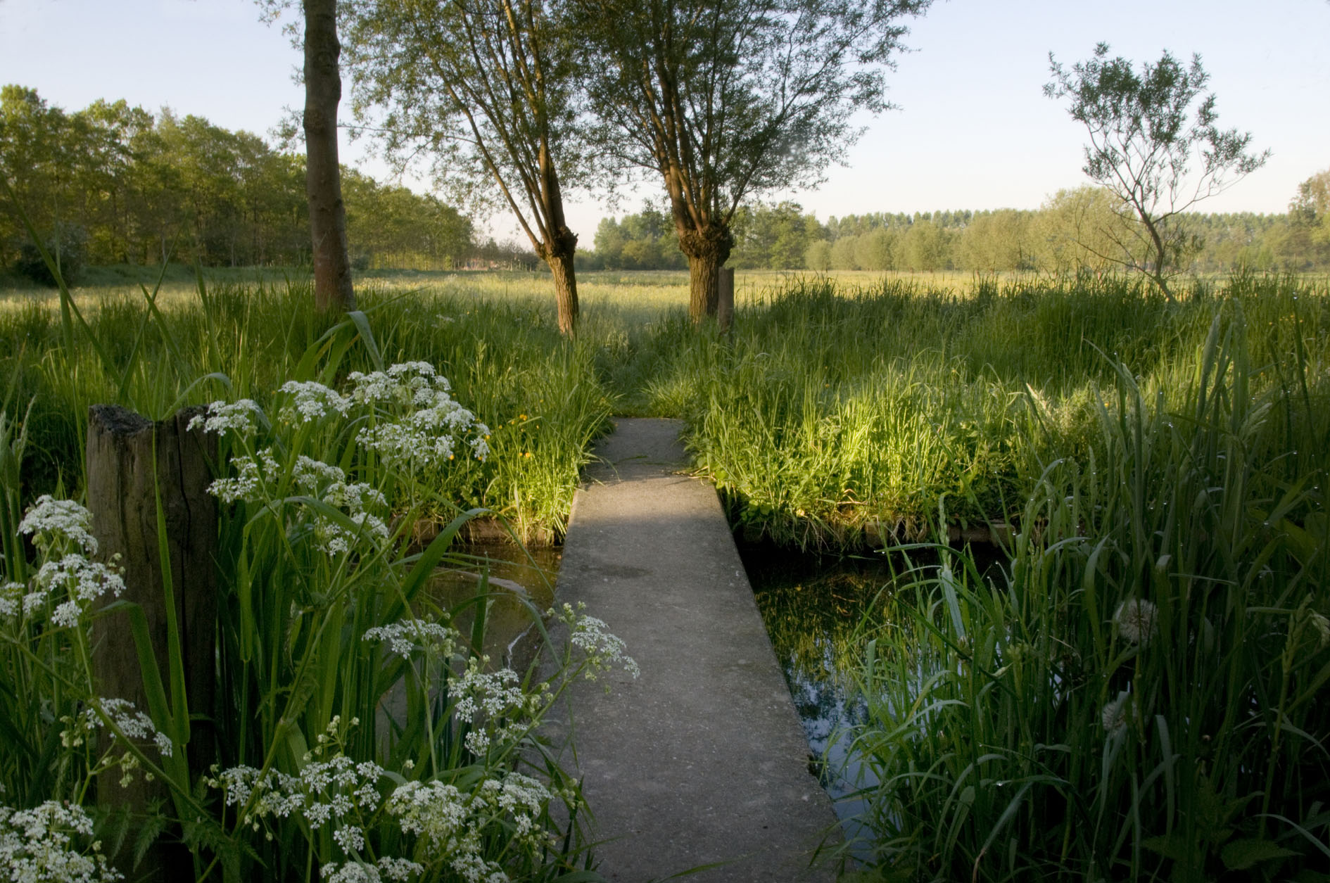 Lommel-Kolonie, De Watering (hooiweiden).